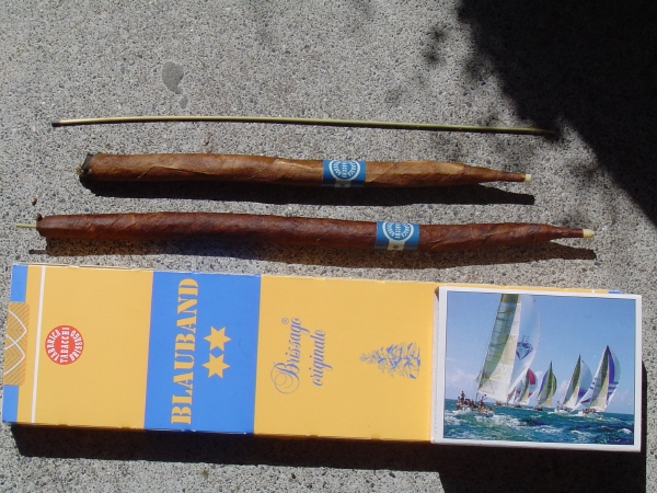 Zigarren «Blauband Brissago originale» mit Schachtel